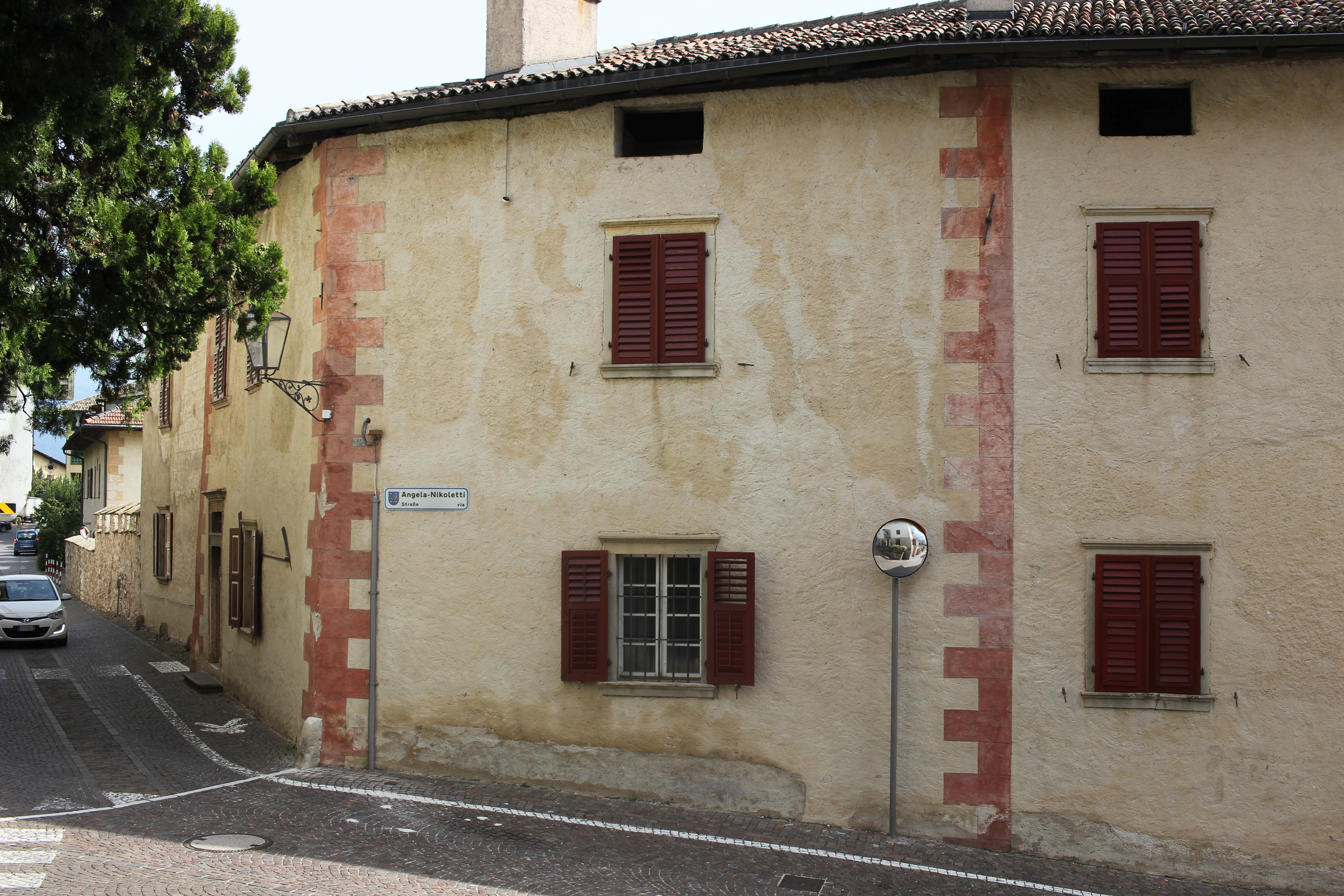 Staffelfeld in Kurtatsch